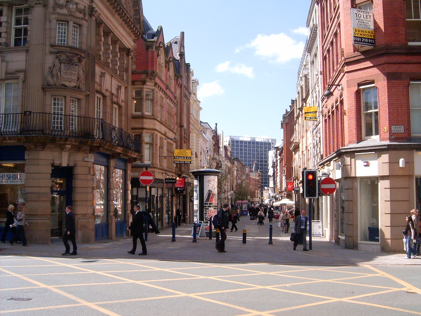 King Street, Manchester